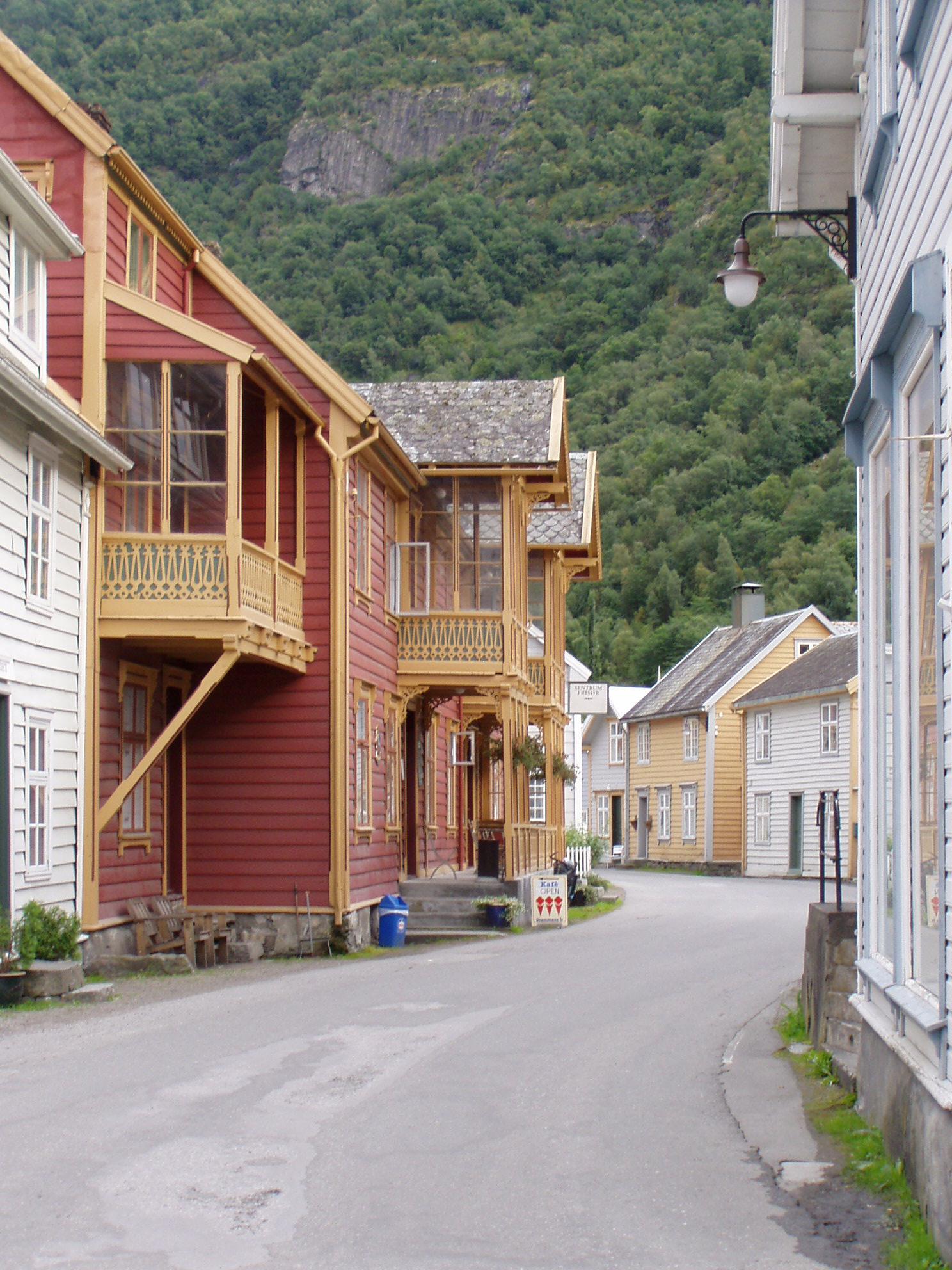 Laerdal